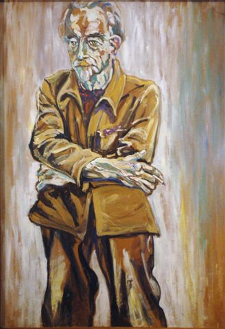 Theo van Reijn geportreteerd door Coks Pijnacker Hordijk (1904-1971)